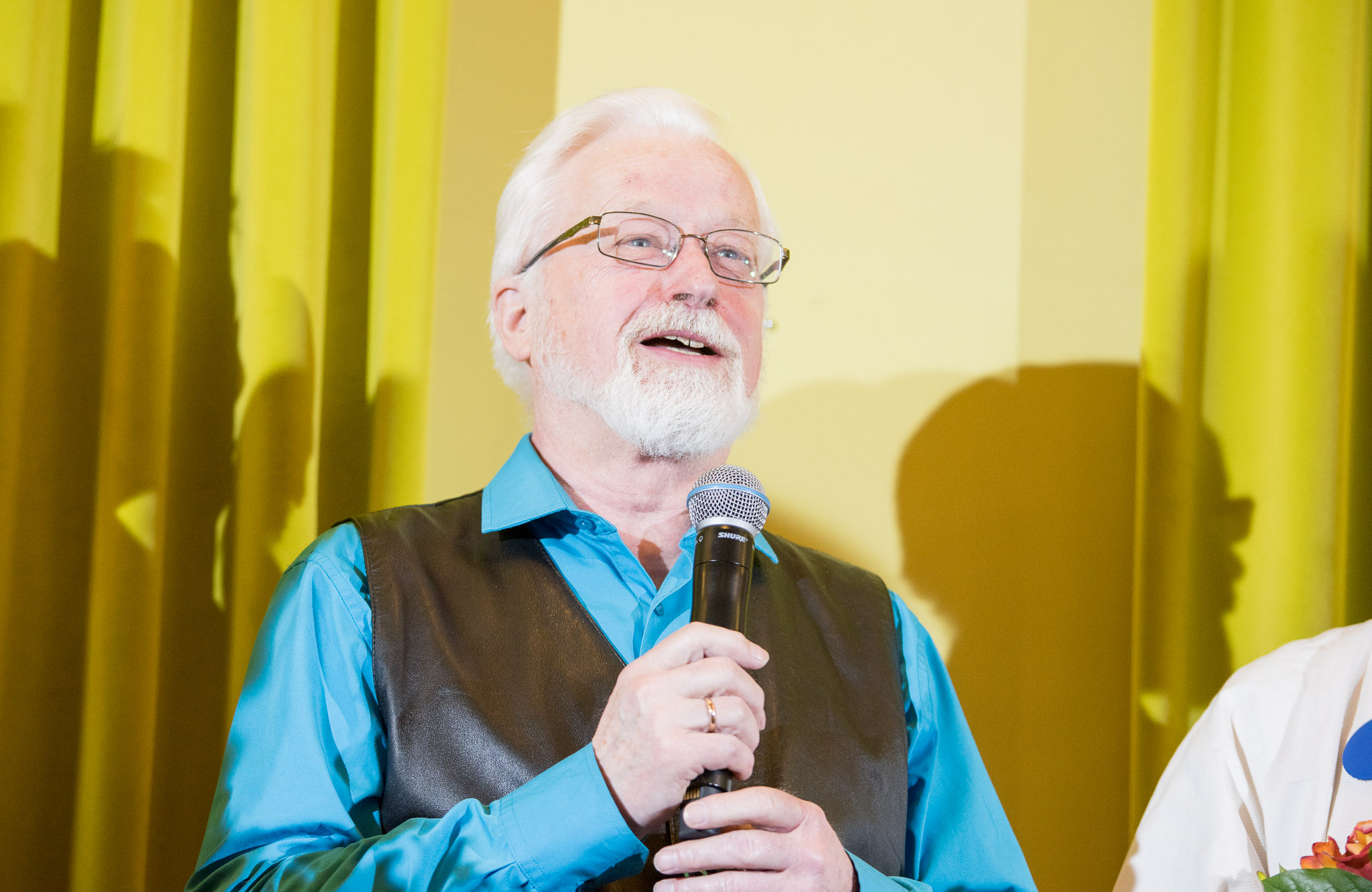 Jaak Kaarma, endine Eesti NSV kultuuriminister. Kultuuriministeeriumi 65. aastapäev